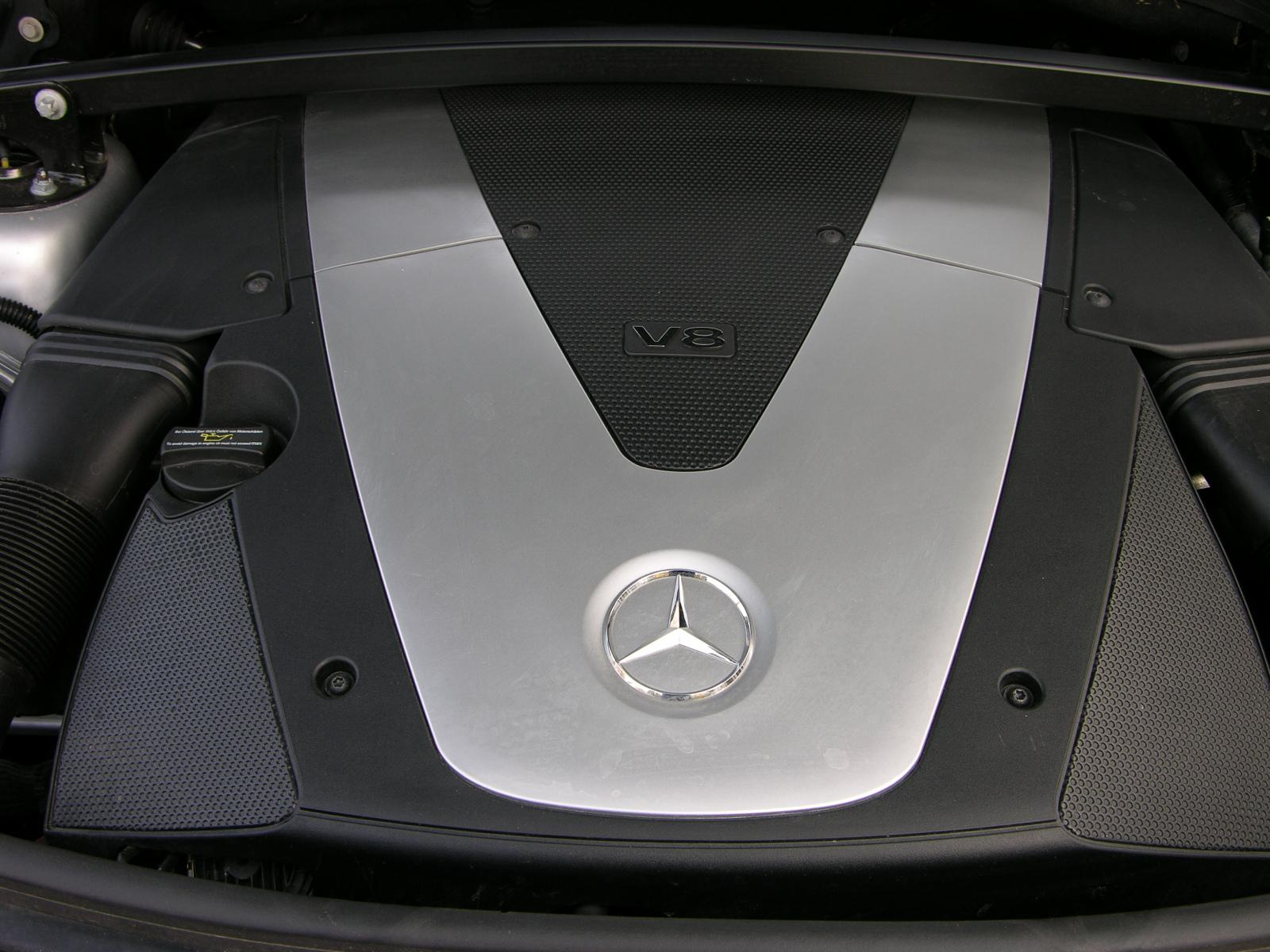 Mercedes Benz GL420 CDi 4-Matic